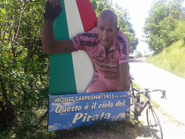 Gedenktafel für Marco Pantani auf dem Monte Carpegna